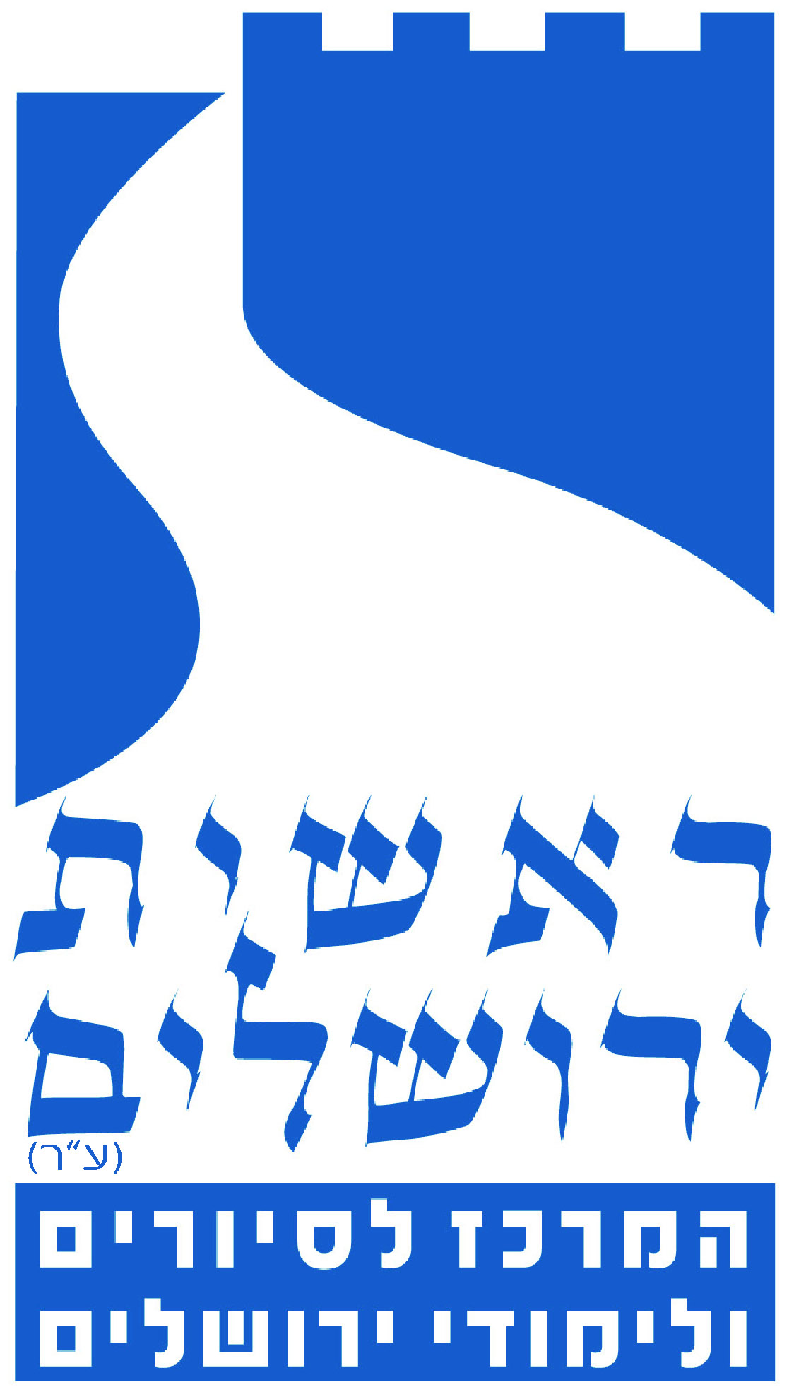 ראשית ירושלים המרכז לסיורים ולימודי ירושלים